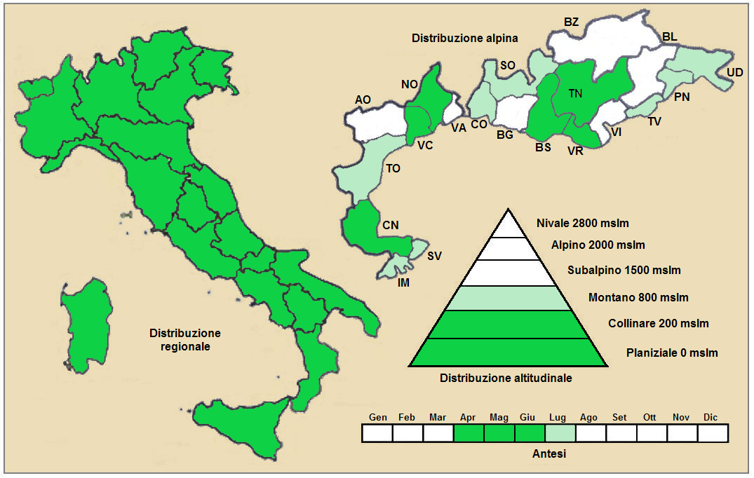 Forasacco di Gussone (Bromus diandrus) - Distribuzione in Italia